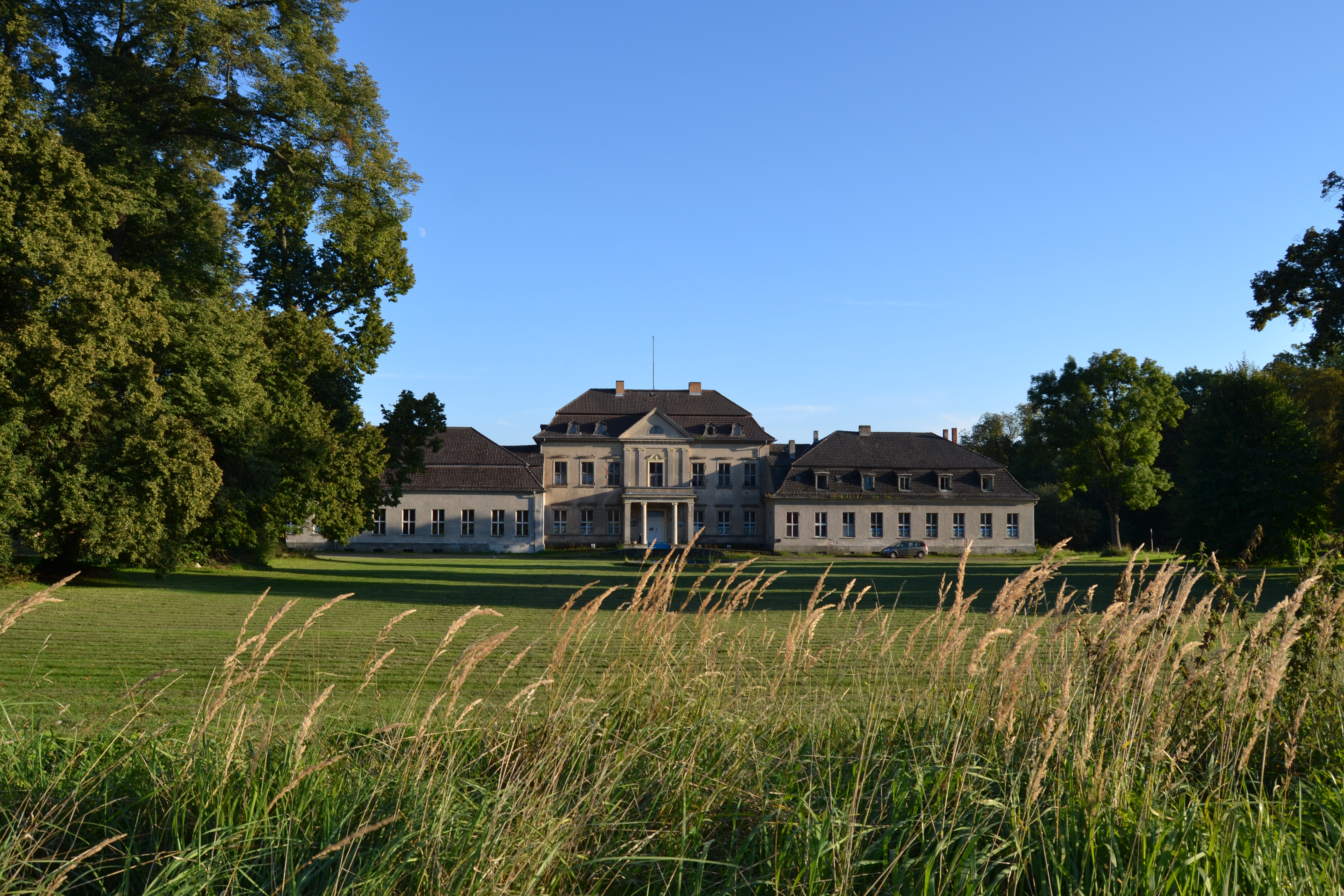 Baudenkmal Schlossanlage mit Wirtschaftshof, Nebengebäuden und Schlosspark. Die Schlossanlage wurde 1770 errichtet. 1859 ist das Schloss durch Friedrich August Stüler umgebaut worden. Der Schlosspark wurde ebenfalls 1770 geschaffen, ist aber nur noch in Teilen so erhalten, wie er angelegt wurde.